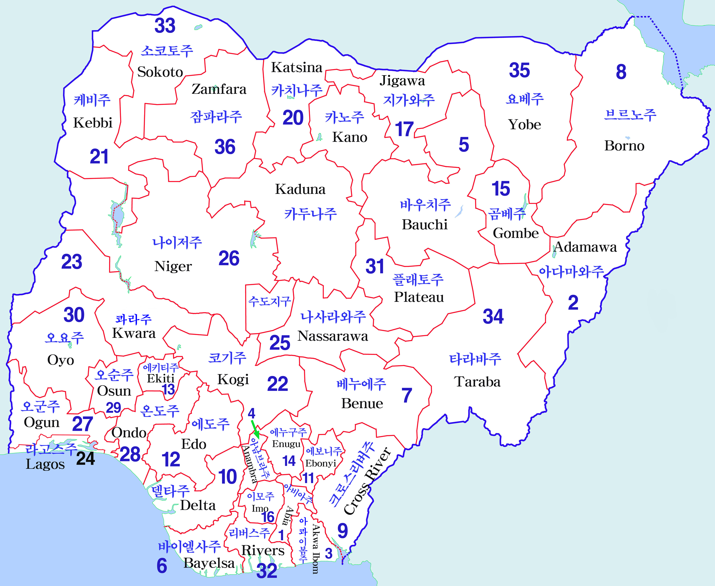 나이지리아행정구역